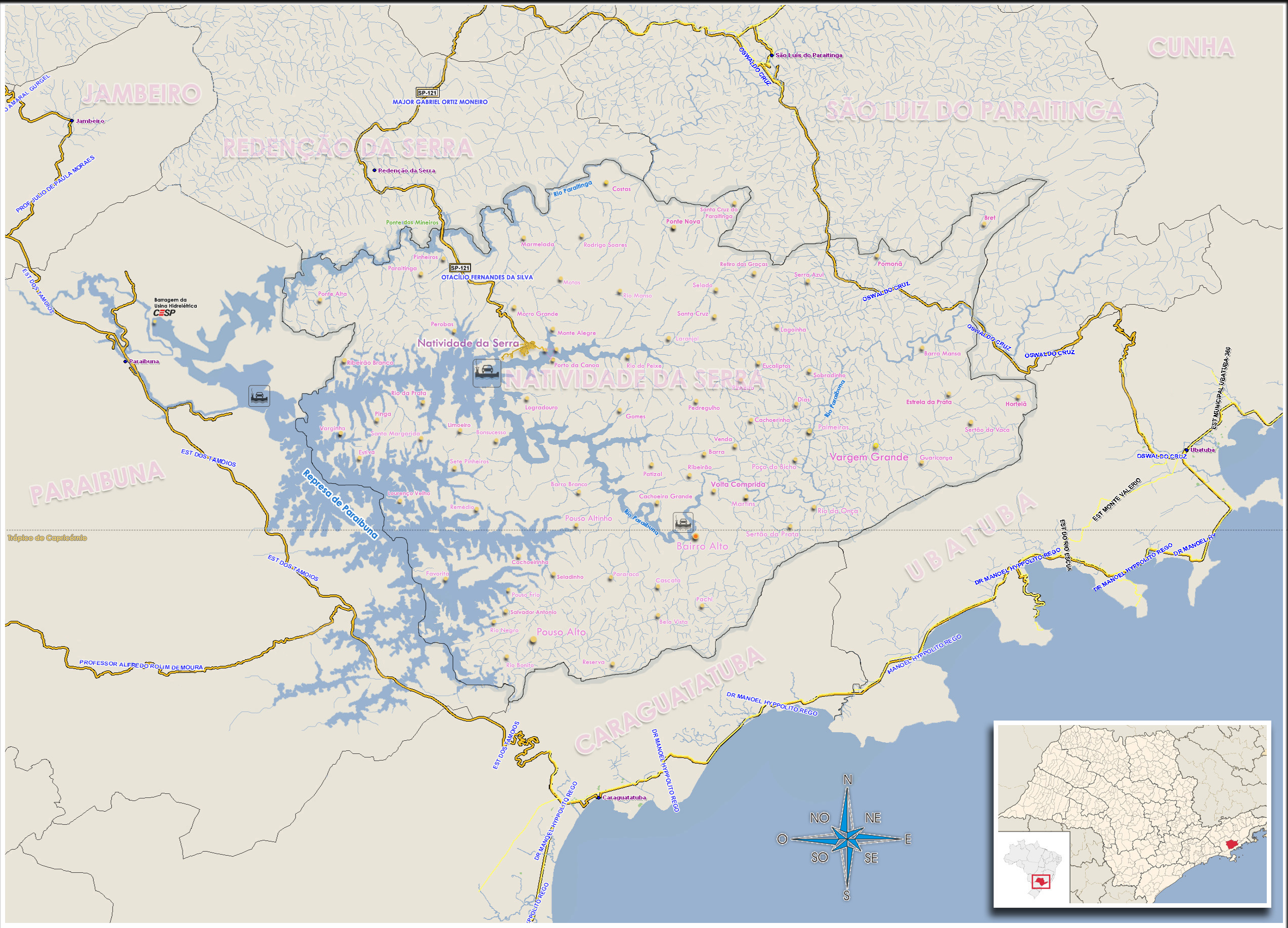 Mapa do Muncípio de Natividade da Serra, São Paulo, Brasil